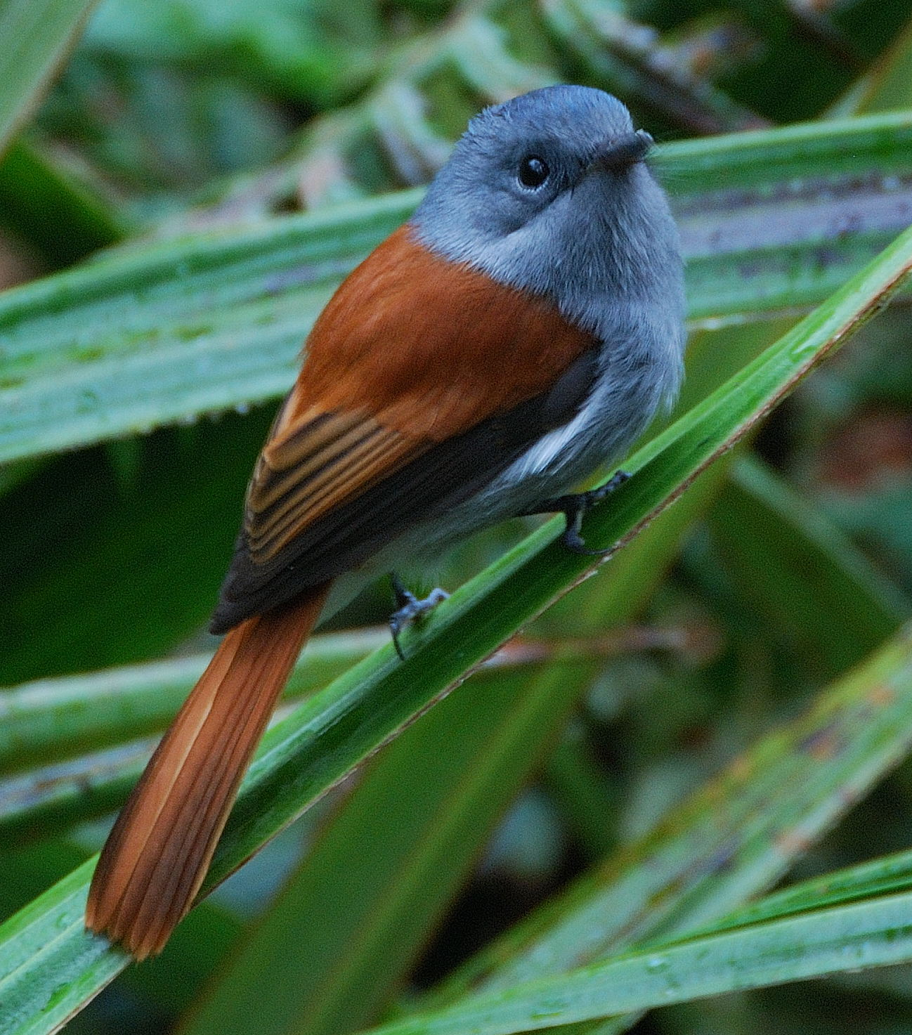 zoiseau la vierge (Terpsiphone bourbonnensis)